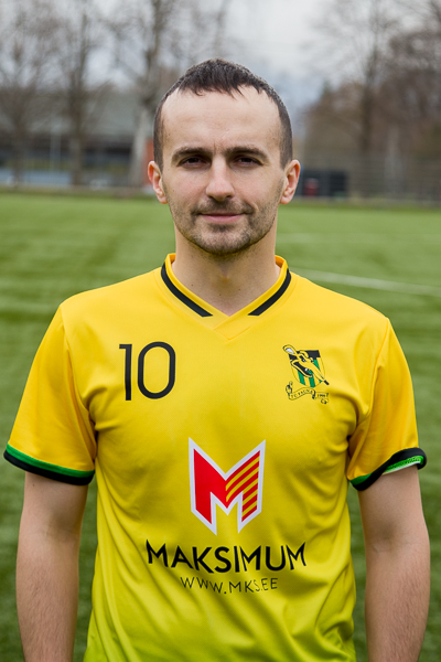 Jalgpallur Maksim Mitrofanov